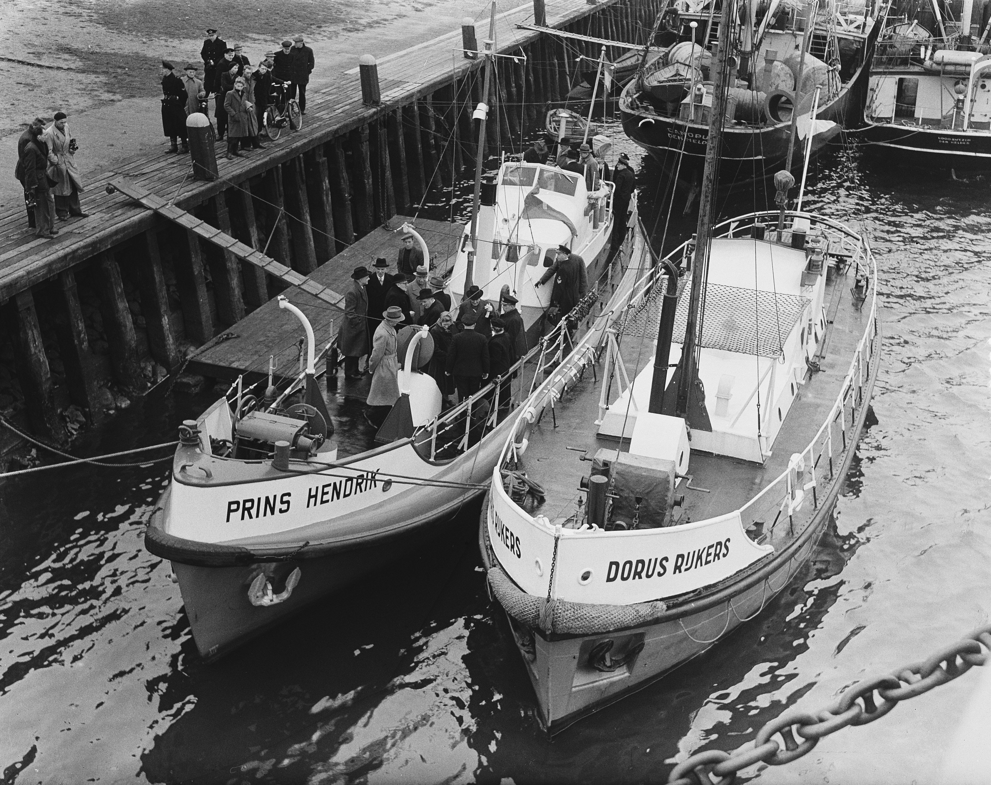 Collectie / Archief : Fotocollectie Anefo Reportage / Serie : [ onbekend ] Beschrijving : Overdracht "Prins Hendrik", de nieuwe reddingboot van Den Helder. Hier op de foto met de oude reddingboot de "Dorus Rijkers" uit 1923 Datum : 8 maart 1952 Locatie : Den Helder, Noord-Holland Trefwoorden : reddingboten Fotograaf : Duinen, […] van / Anefo Auteursrechthebbende : Nationaal Archief Materiaalsoort : Glasnegatief Nummer archiefinventaris : bekijk toegang 2.24.01.09 Bestanddeelnummer : 904-9985